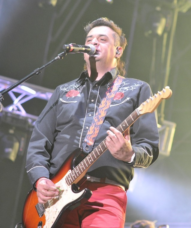 Gustavo Montecchia.